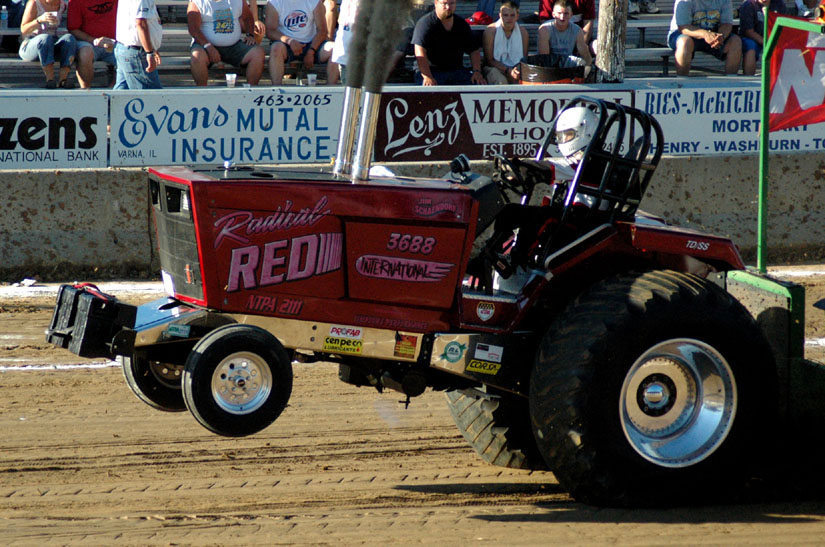 Gettin' er on...